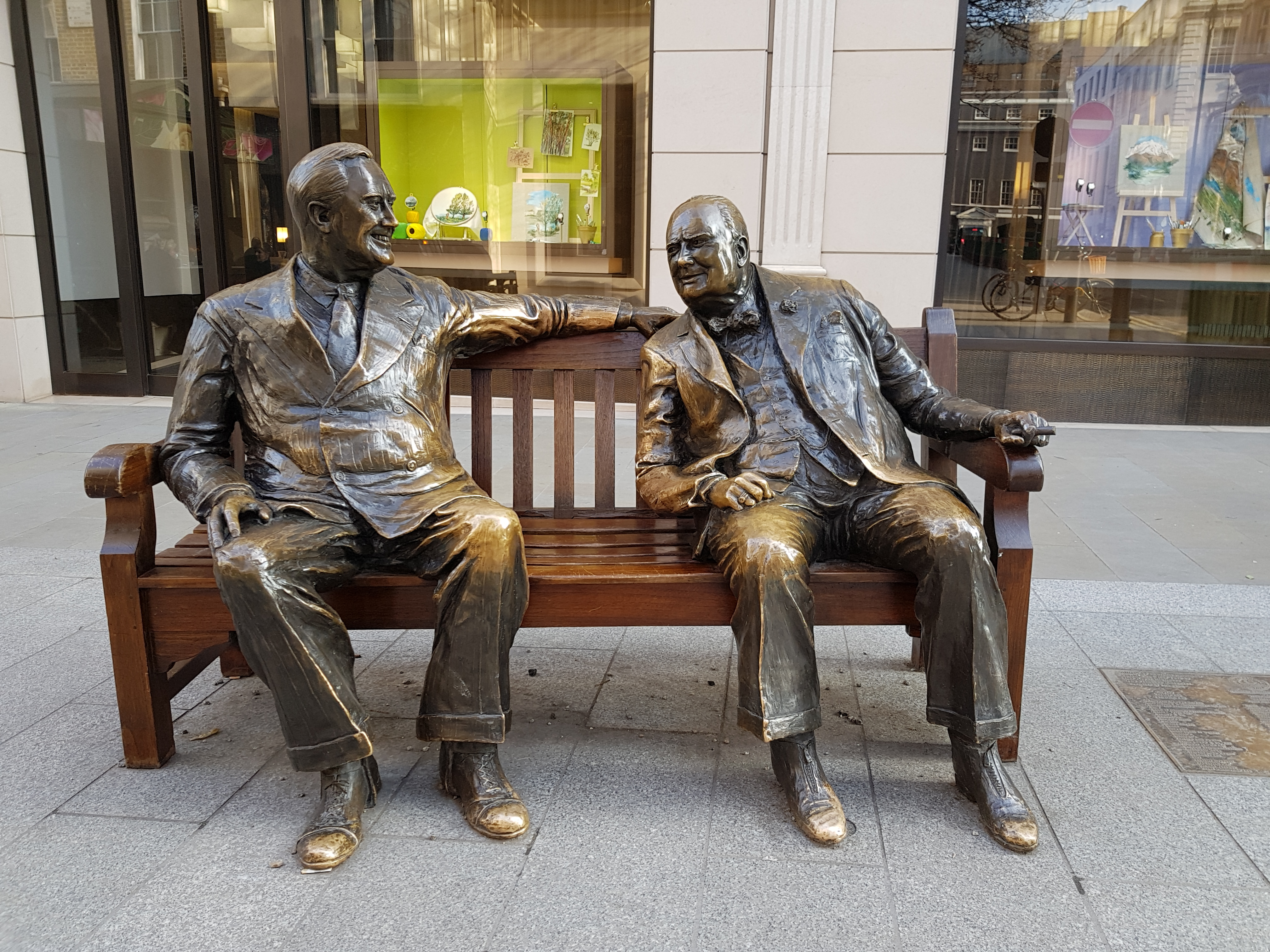 "Les Alliés", œuvre de Lawrence Holofcener, Bond Street, Londres (1995).